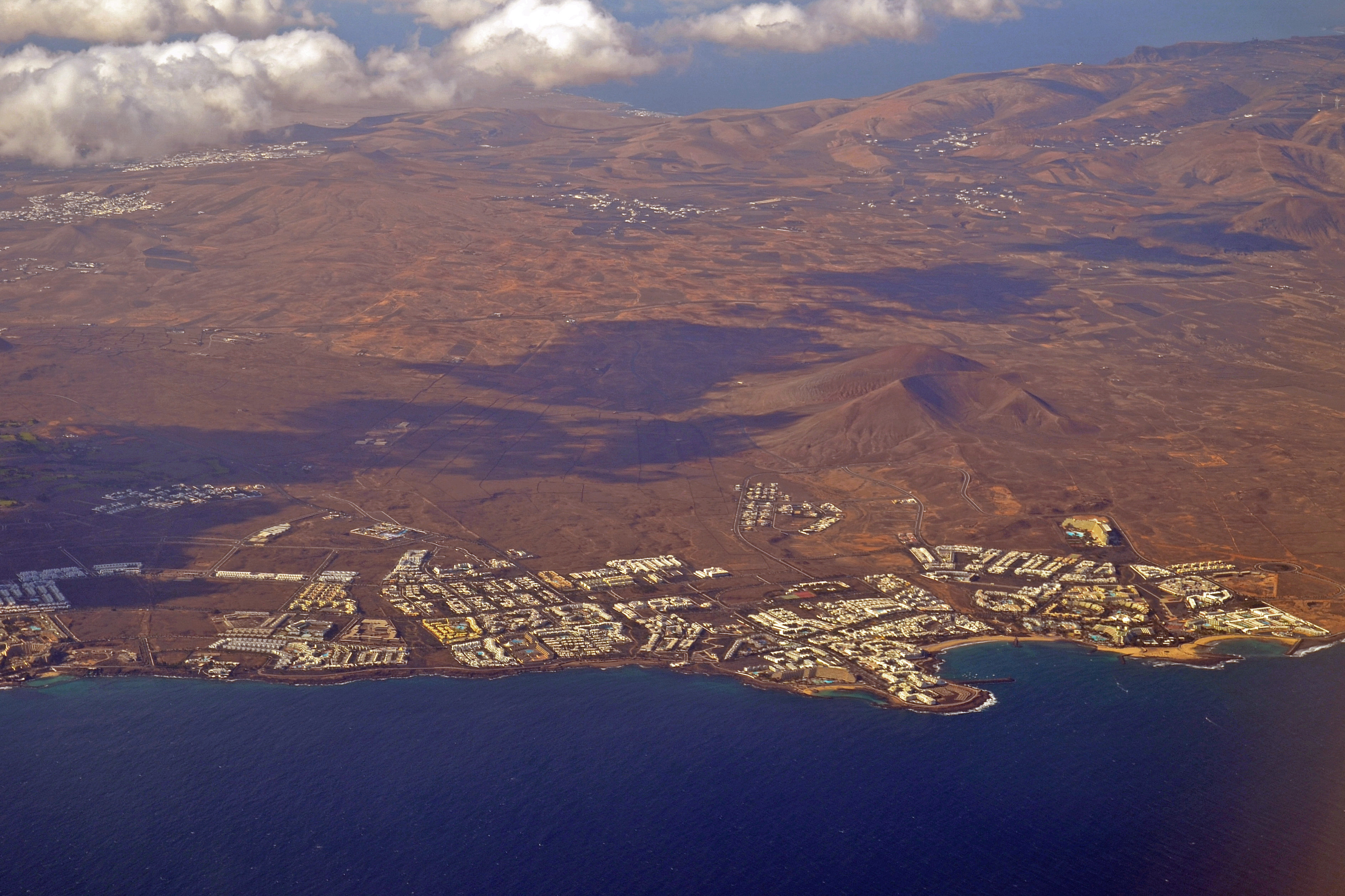 Costa Teguise aus der Luft, Lanzarote, Spanien